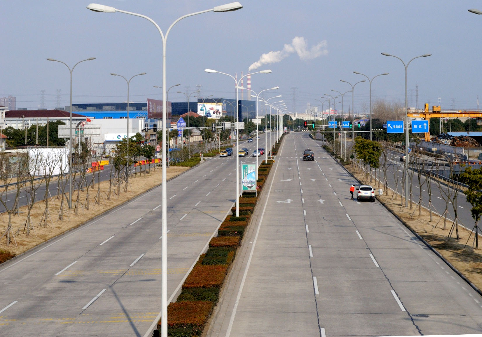 宁镇公路，摄于明州大桥过街天桥